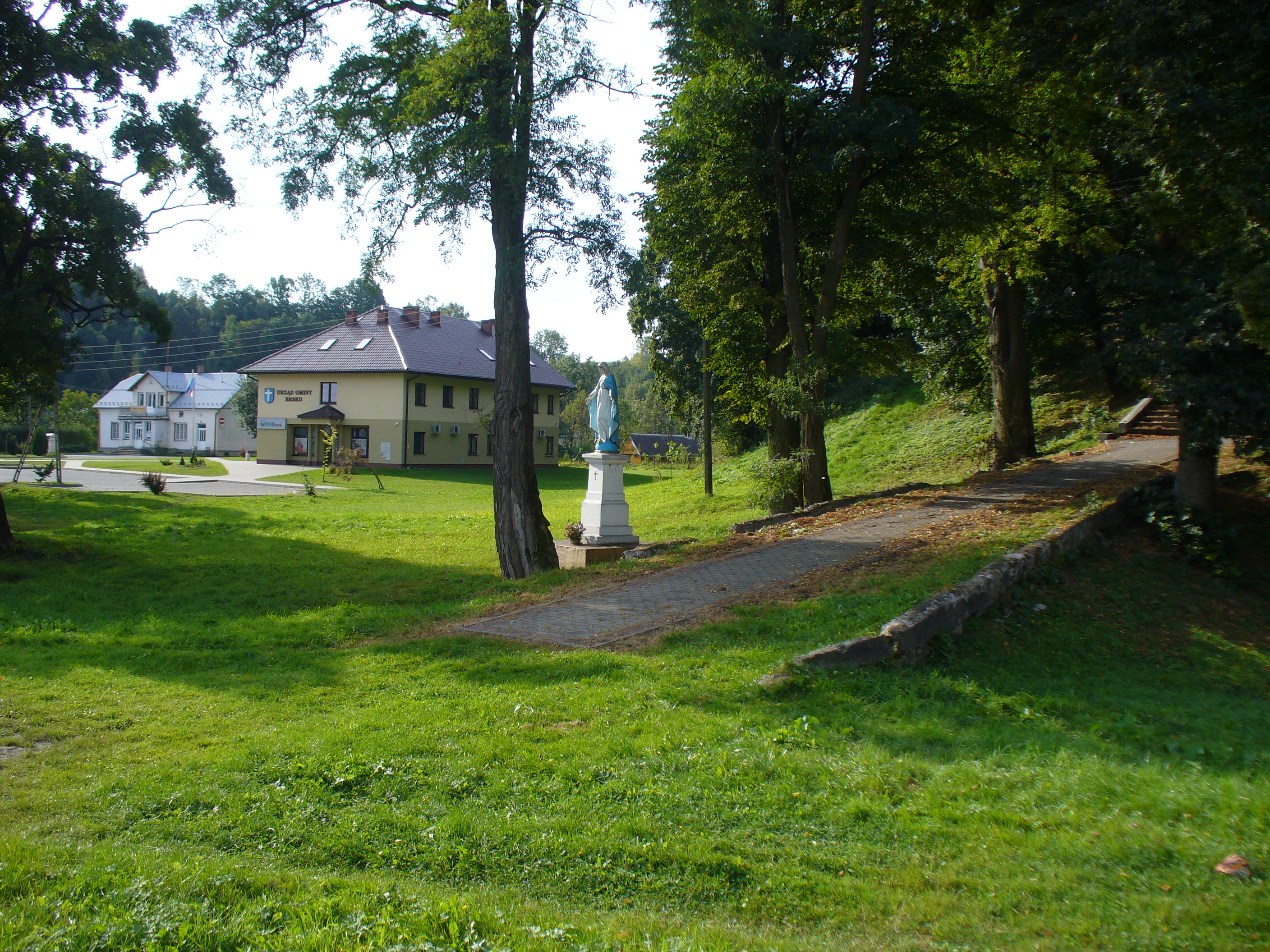 Besko - wejscie na cer. i budynki UG